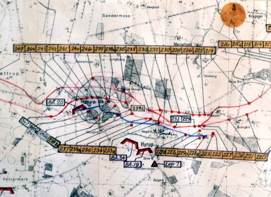 Nøglekortene over stillingens bygninger var nogle af Scotts vigtigste arbejdsredskaber